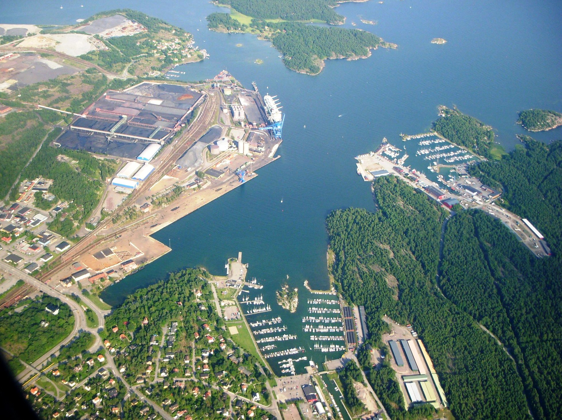 Oxelösund från luften, hamnen